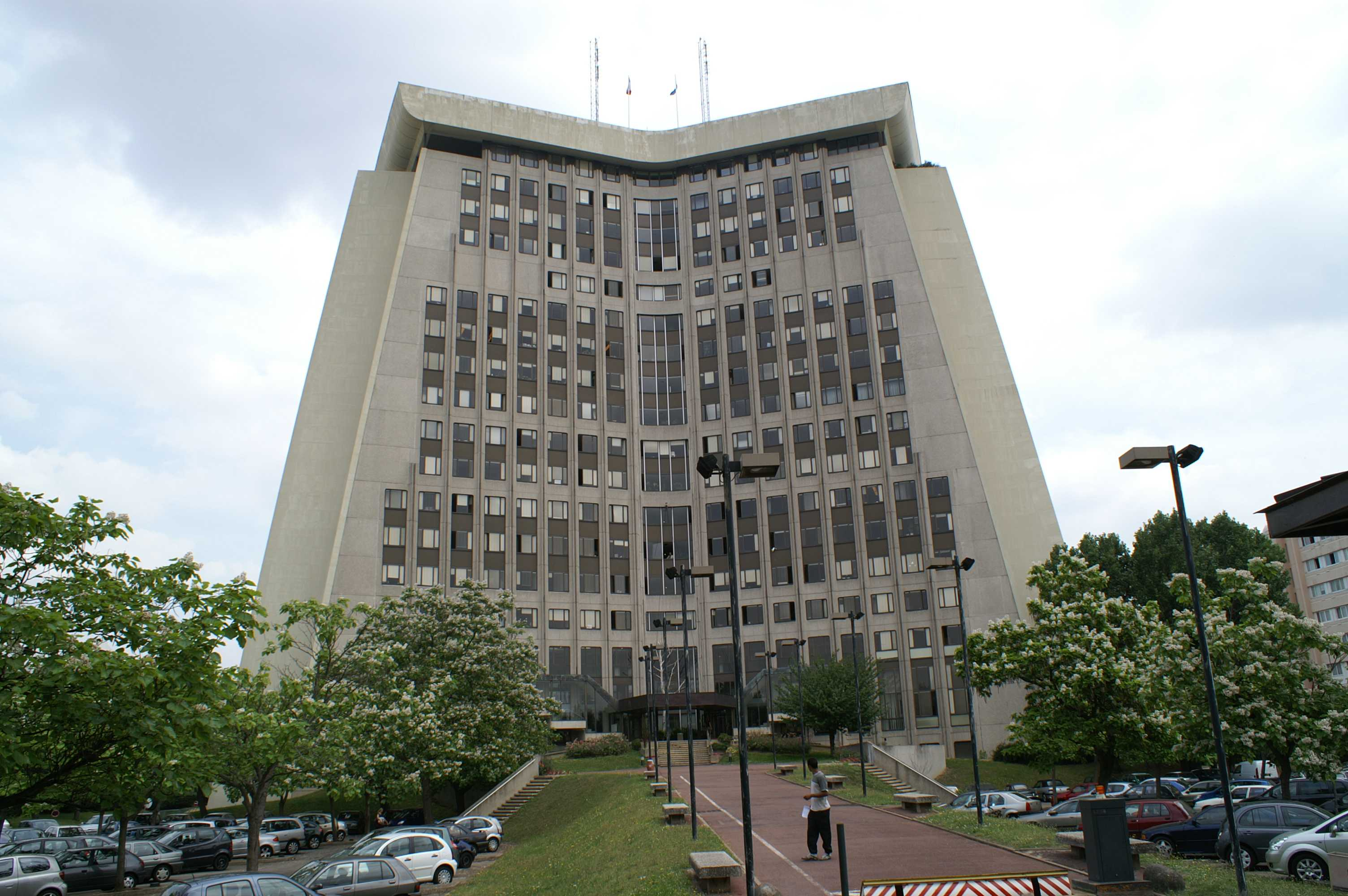 Creteil - Palais de Justice